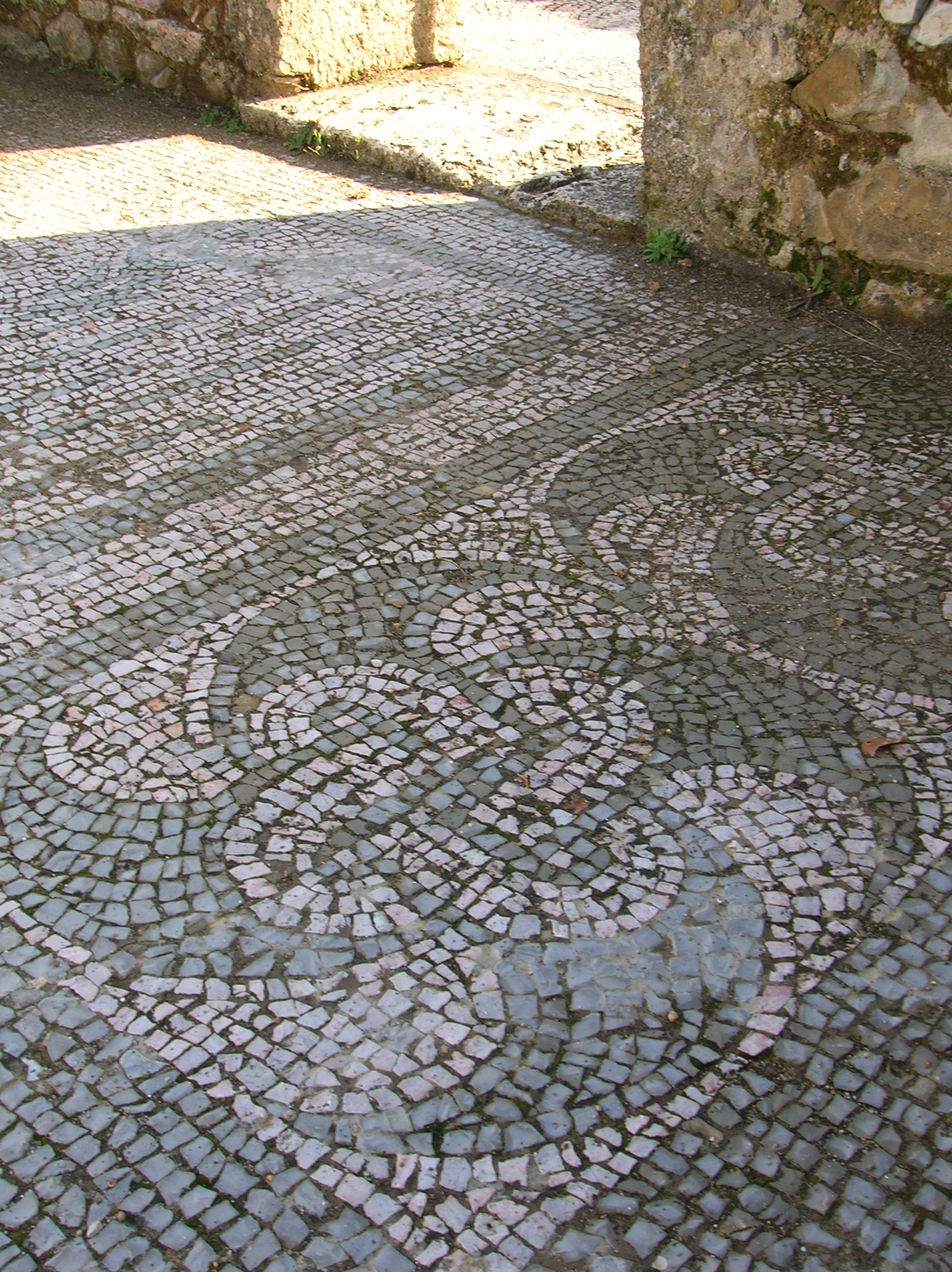 Mosaico romano nell'area archeologica di Roselle, Toscana, Italia